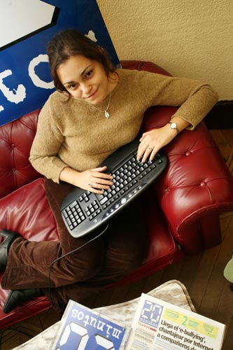 La autora de la trilogía de Memorias de Idhún